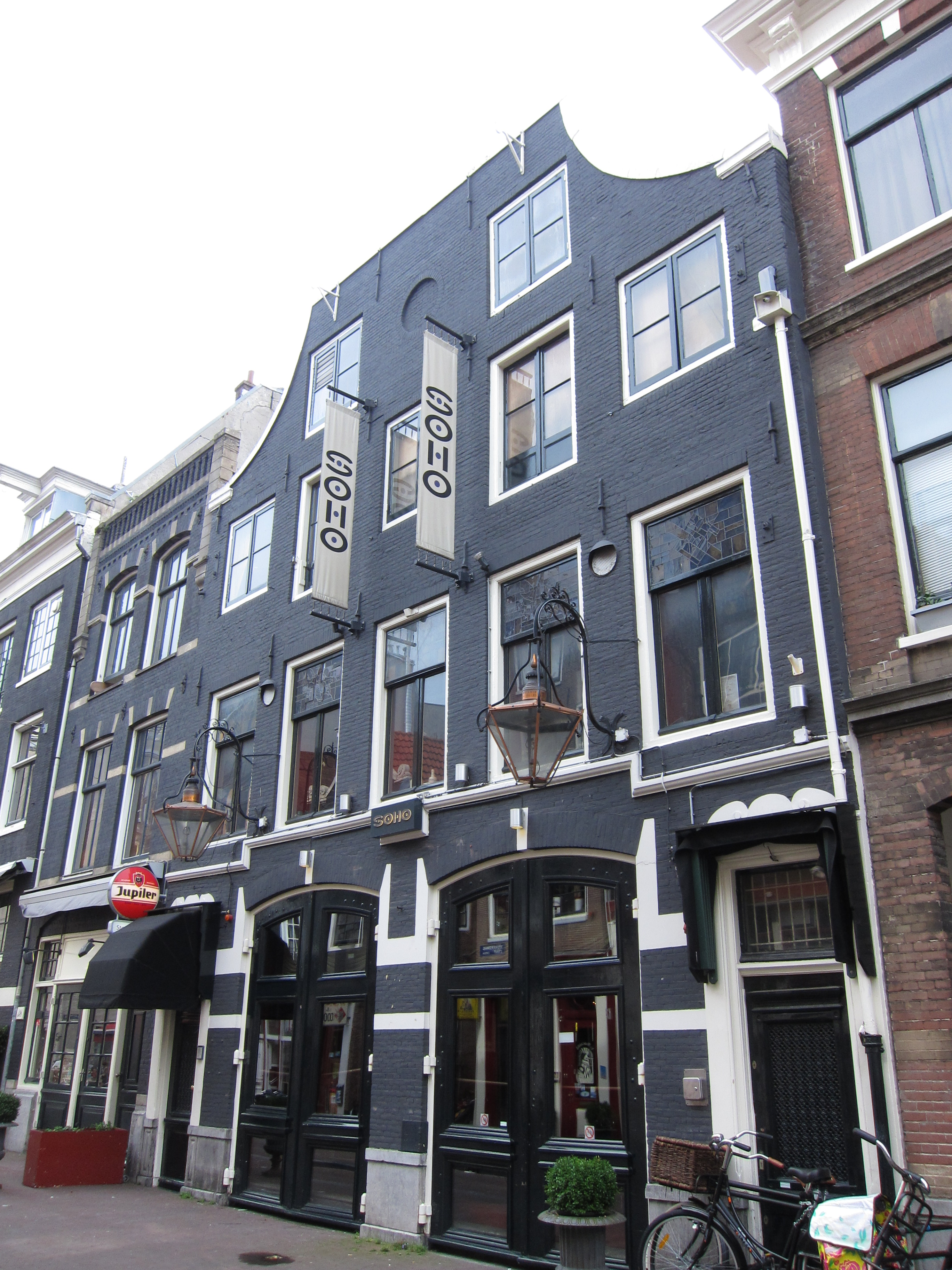 complex koetshuizen met bovenwoningen, sinds 1999 in gebruik als homocafé Soho